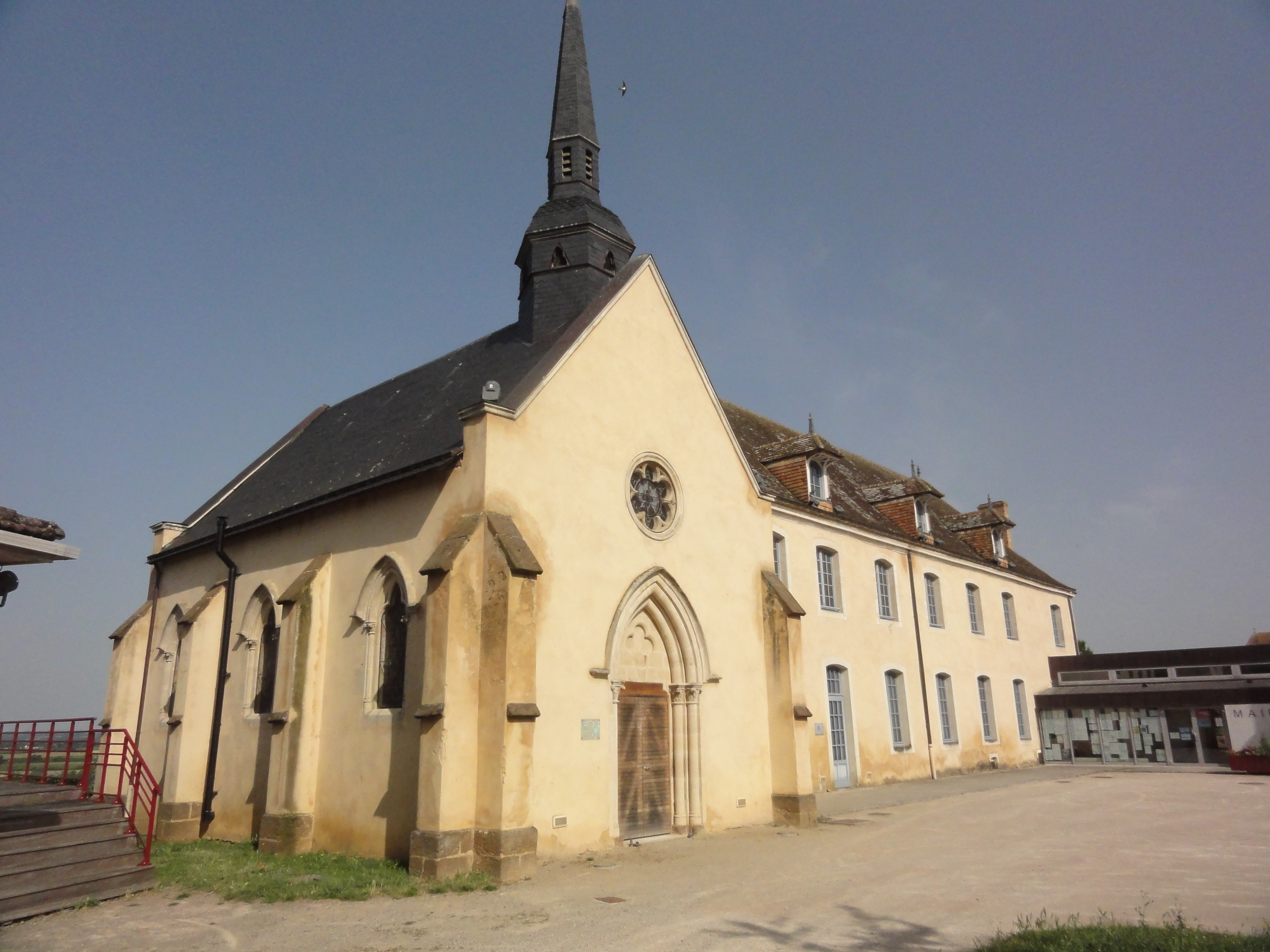 Ballon (Sarthe) Le pavillon de Lansac et la chapelle, avec bibliothèque relais